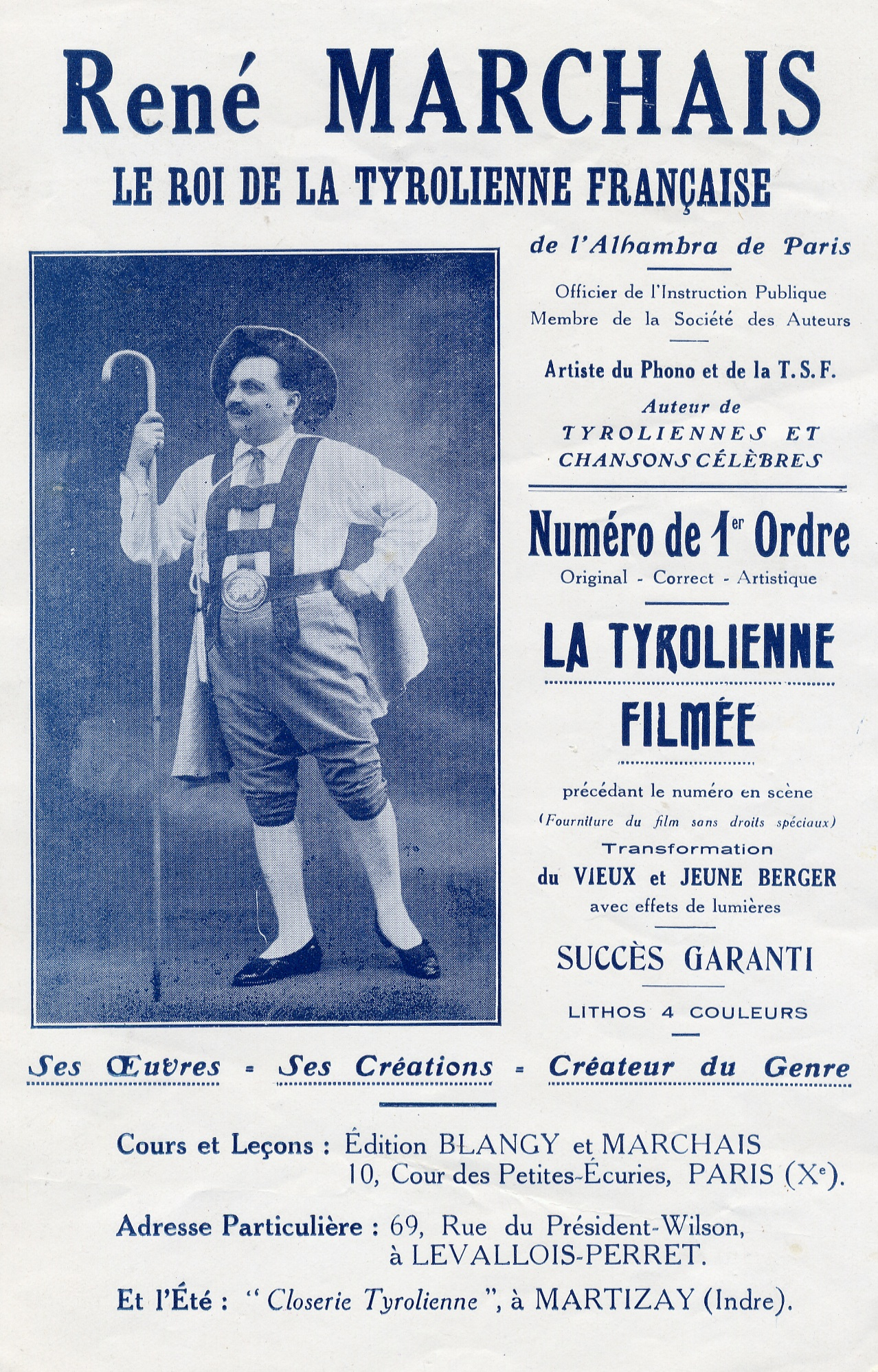 René Marchais Chanteur